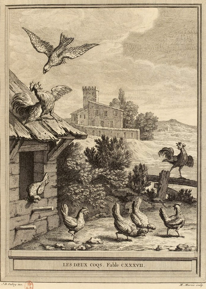 Gravure réalisée par Martin Marvie d'après un dessin de Jean-Baptiste Oudry représentant la fable Les deux coqs de Jean de La Fontaine (fable 12 du livre VII). Cette gravure est parue dans l'édition complète des fables de La Fontaine, parue en quatre tomes chez l'éditeur Desaint & Saillant, rue saint Jean de Beauvais à Paris, 1755-1759.